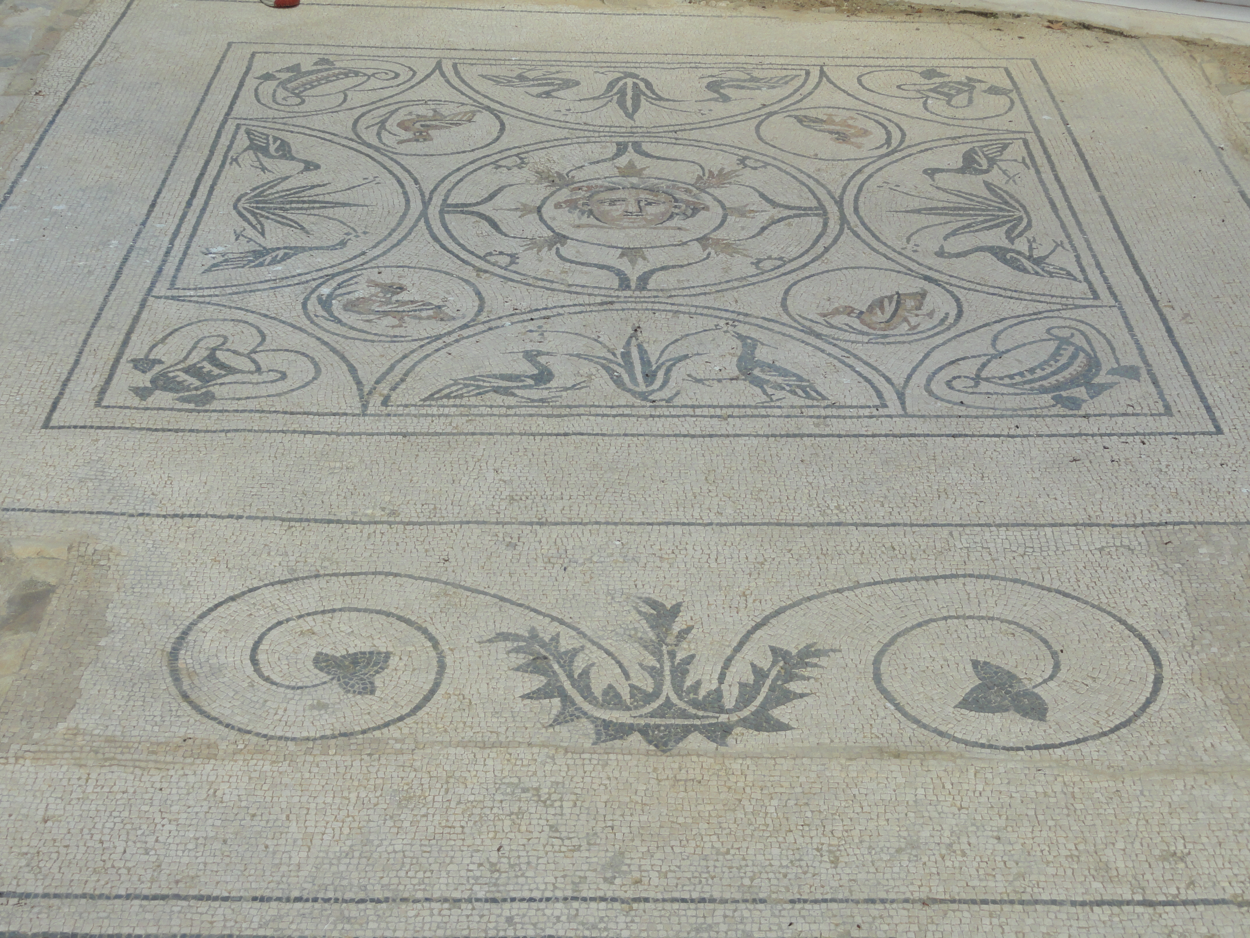 Villa romana Río Verde: Gorgoneion